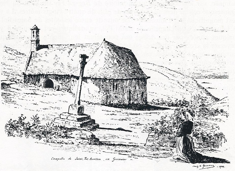 Guimaëc : la chapelle Saint-Pol-Aurélien en 1909 (dessin de Louis Le Guennec).